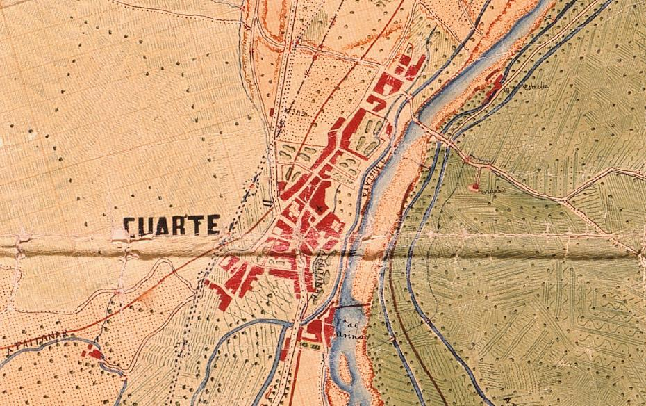 Quart de Poblet el 1883 (el nord està a la dreta).